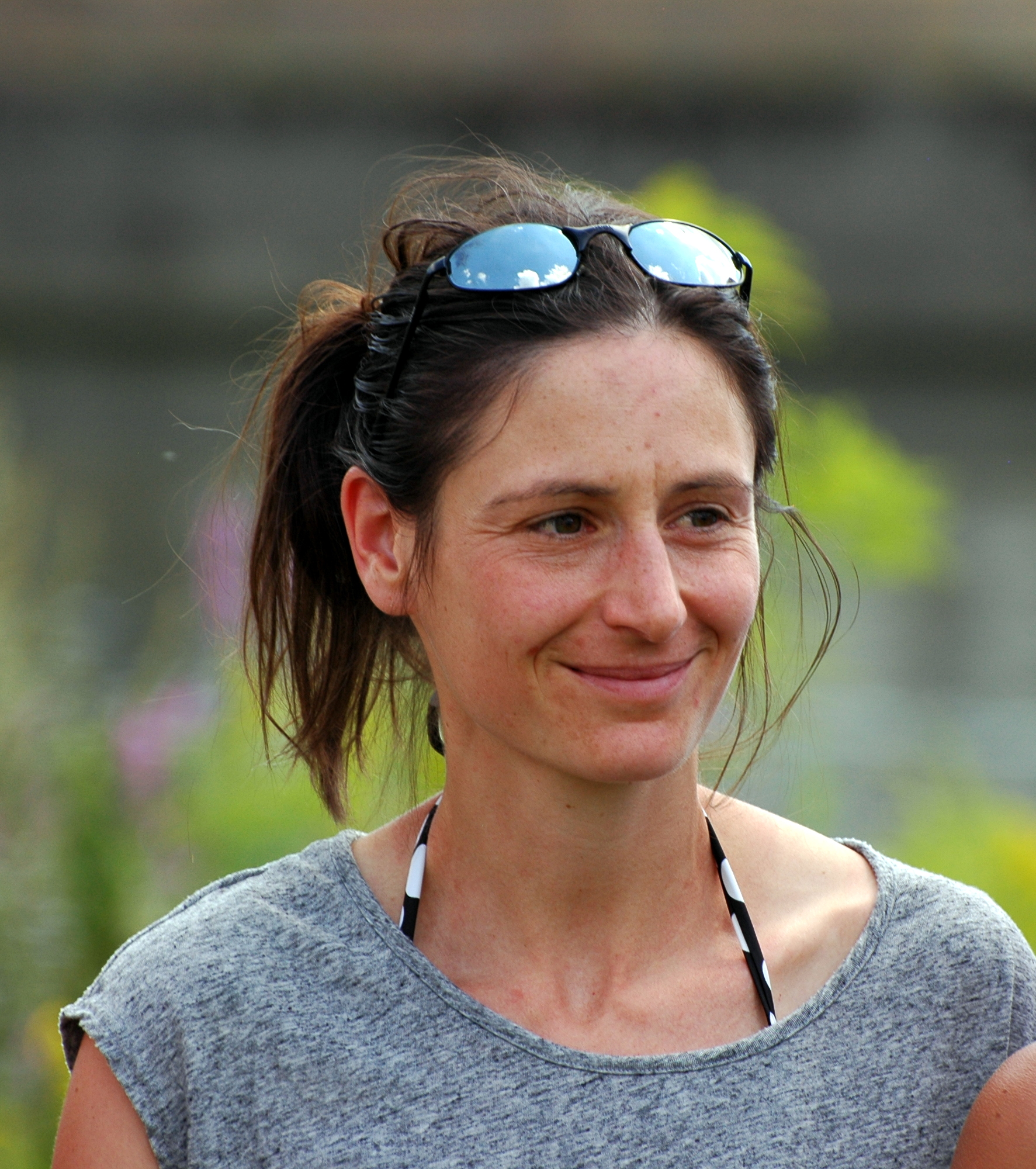 HeidelbergMan 2015 - Almuth Grüber